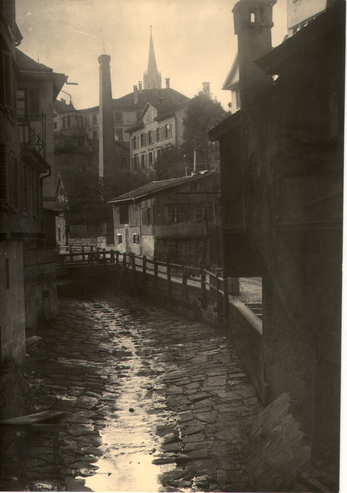 Linsebühl/Lämmlisbrunn, offene Steinach enthält: Blick gegen Südwesten